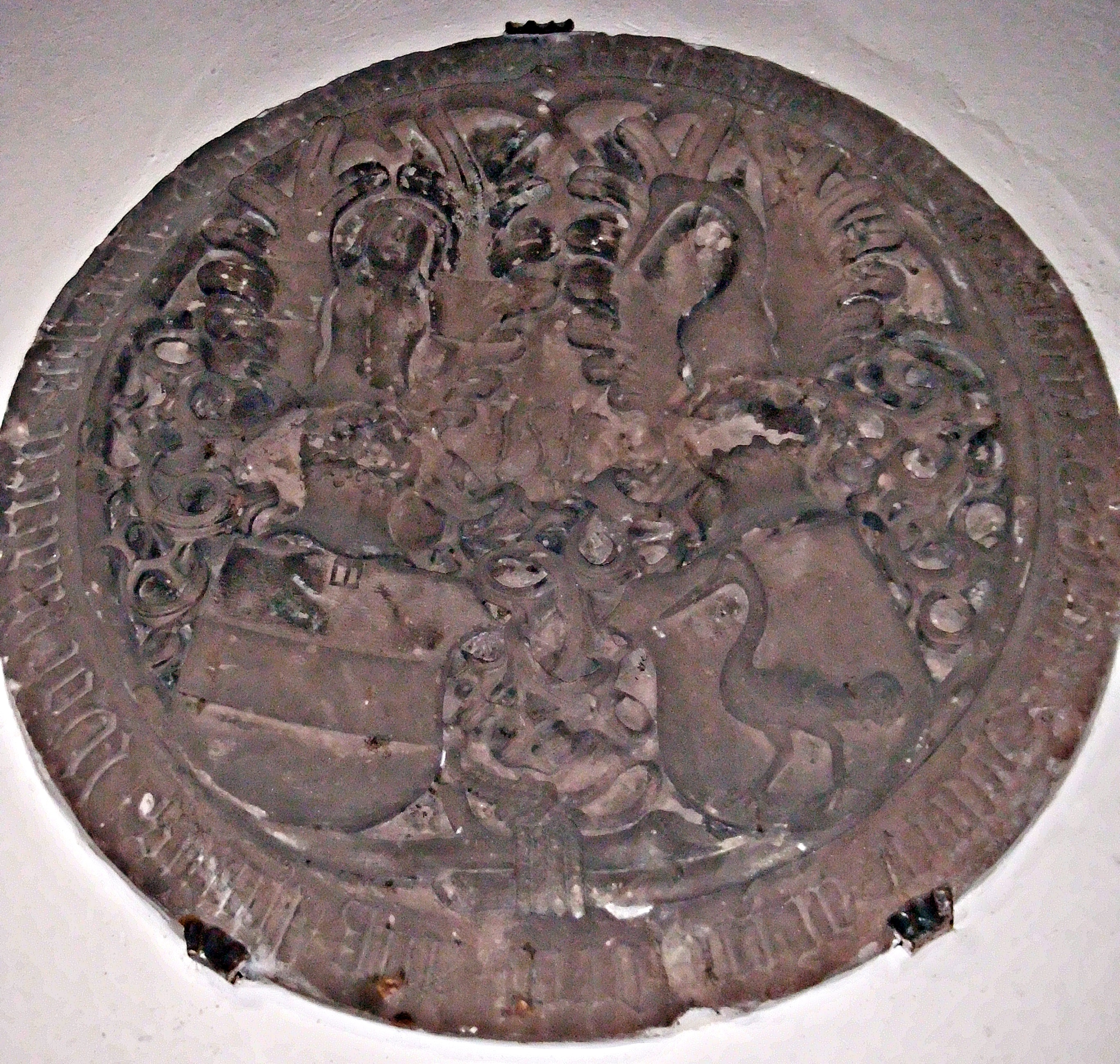 Schlußstein aus dem Wormser Domkreuzgang (heute Stadtmuseum Worms), gestiftet 1513 von Philipp von Flersheim, mit seinem elterlichen Allianzwappen